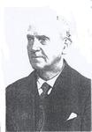 Julius Koch (eigentlich: Julius Dörzbacher), königlich-württembergischer Hoffrüchtehändler und Großvater Albert Einsteins